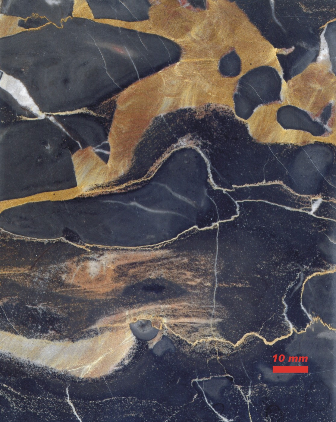 Kalkstein (Jura) aus der Lagerstätte von Porto Venere (Ligurien, Italien)